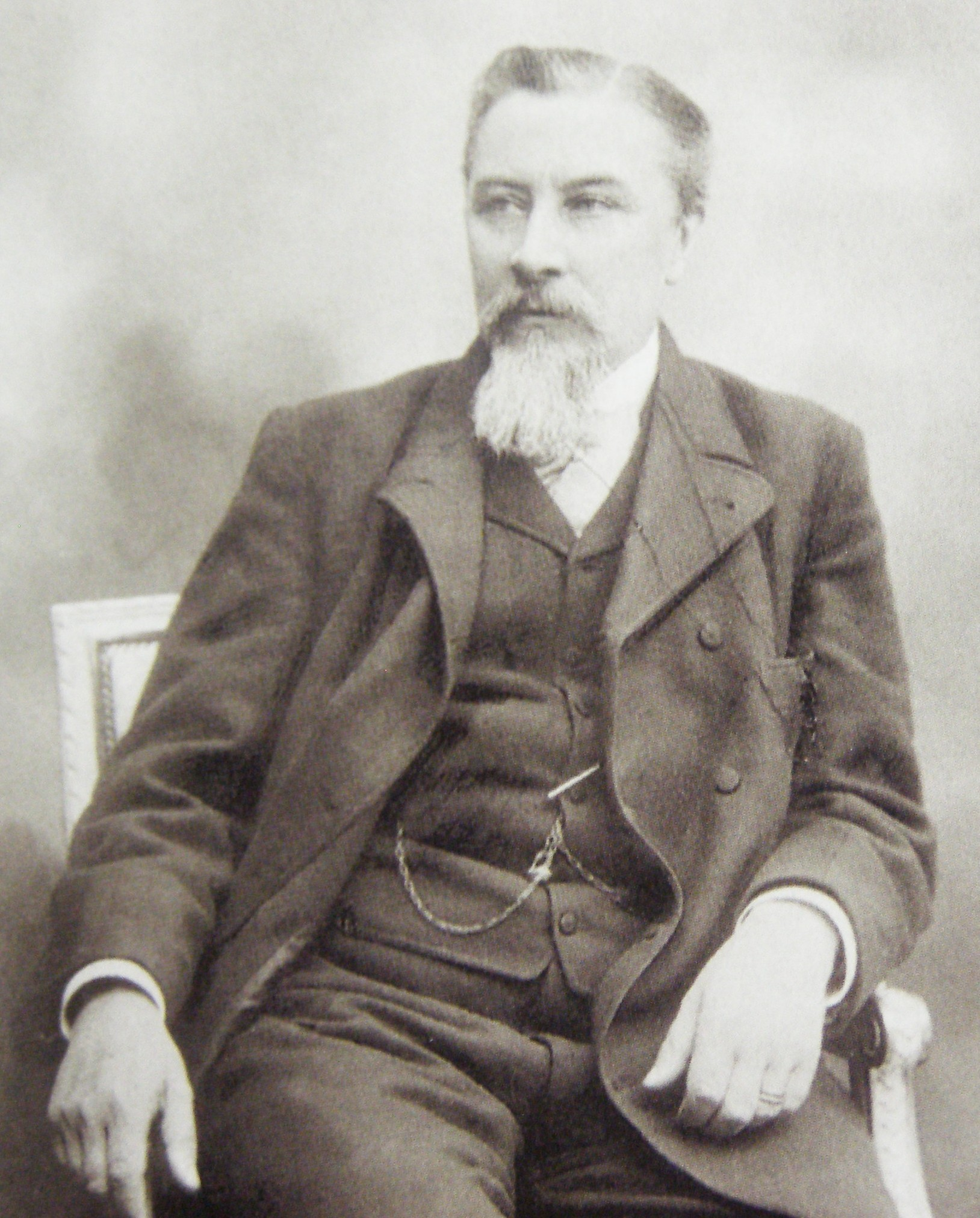 Генрих Семирадский (1843 - 1902) в 1899 году. Фотография